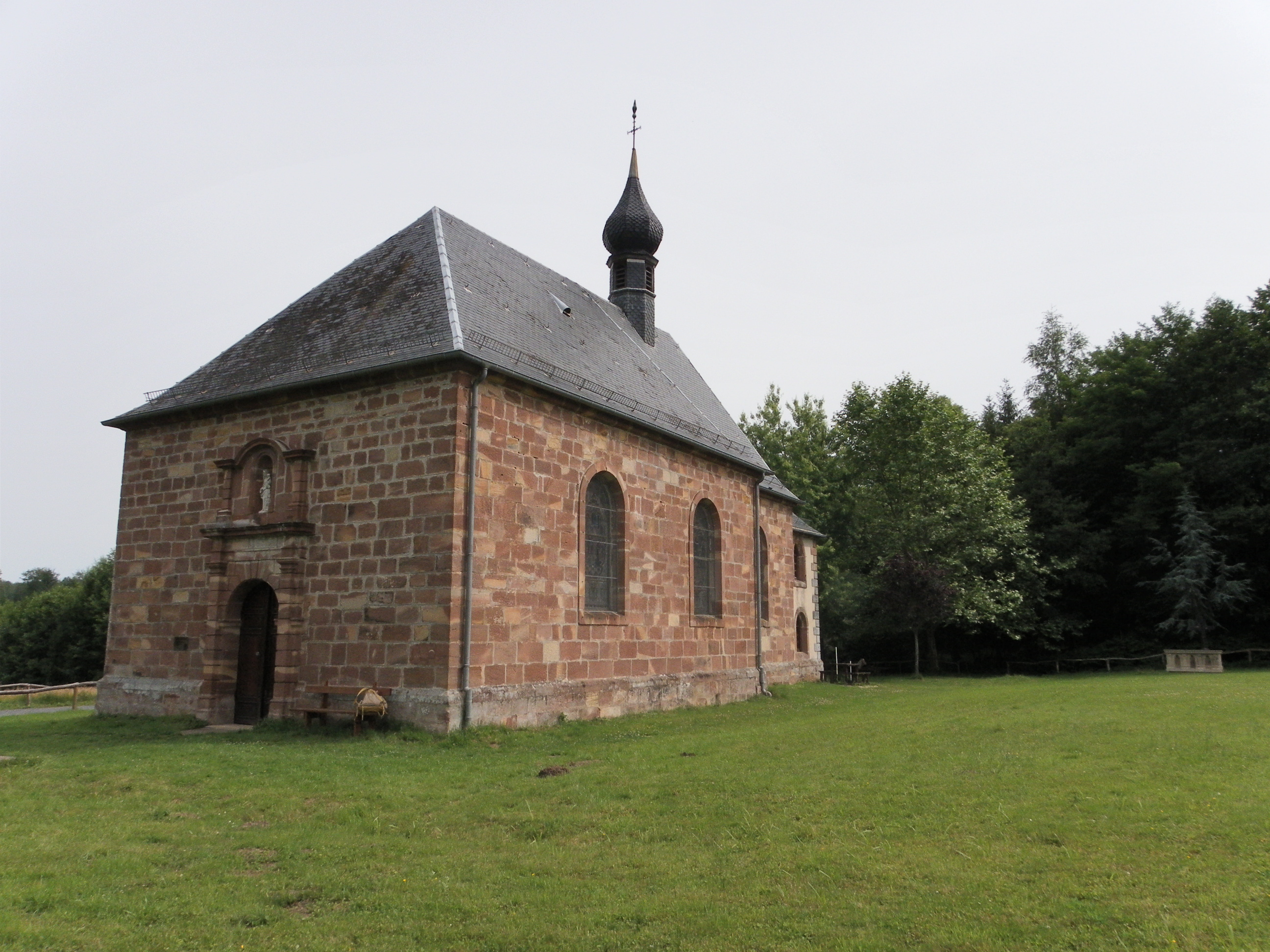 Chapelle Notre-Dame-de-Lhor à Métairies-Saint-Quirin, Moselle, France.